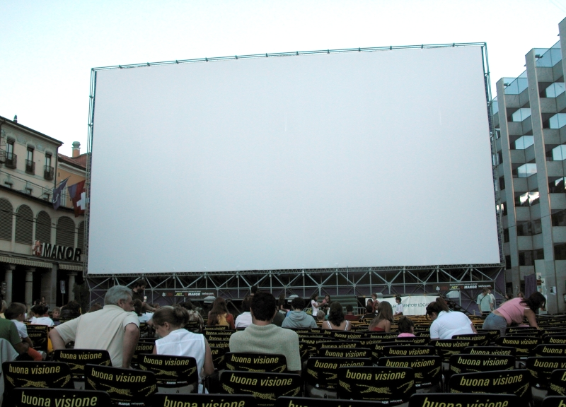 Filmfestspiele, Locarno, Schweiz, Swizzerland